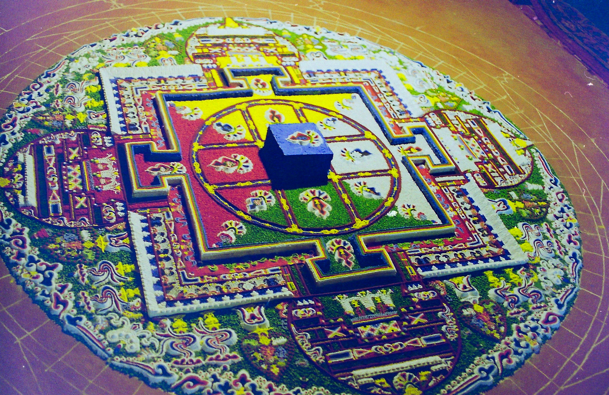 Réalisation d'un dull tson kyll khor (Mandala) (scan d'une de mes photos prise lors d'un voyage au Ladakh en 1995) 1995)